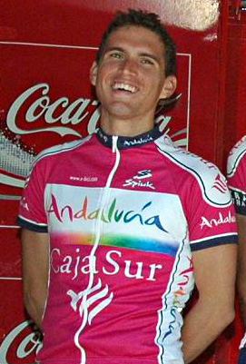 José Antonio Redondo. Andalucía-Cajasur, Euskal Bizikleta 2008